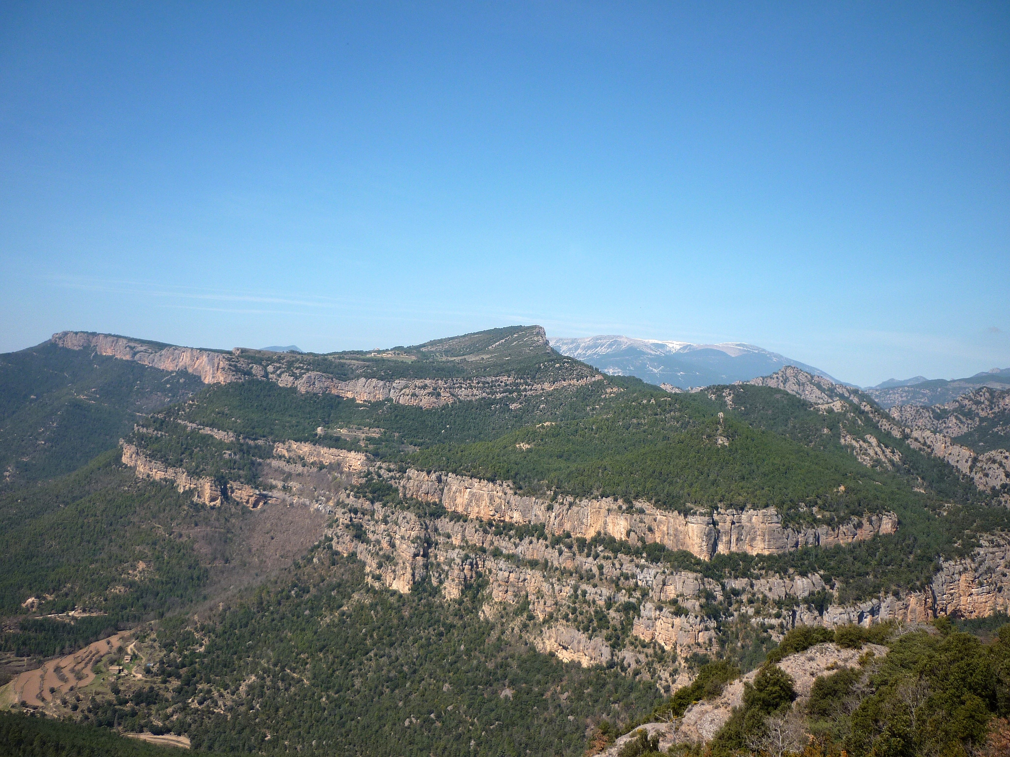 Vista de conjunt de la Serra de Busa des dels plans de Taravil. Navès (Solsonès - Catalunya)